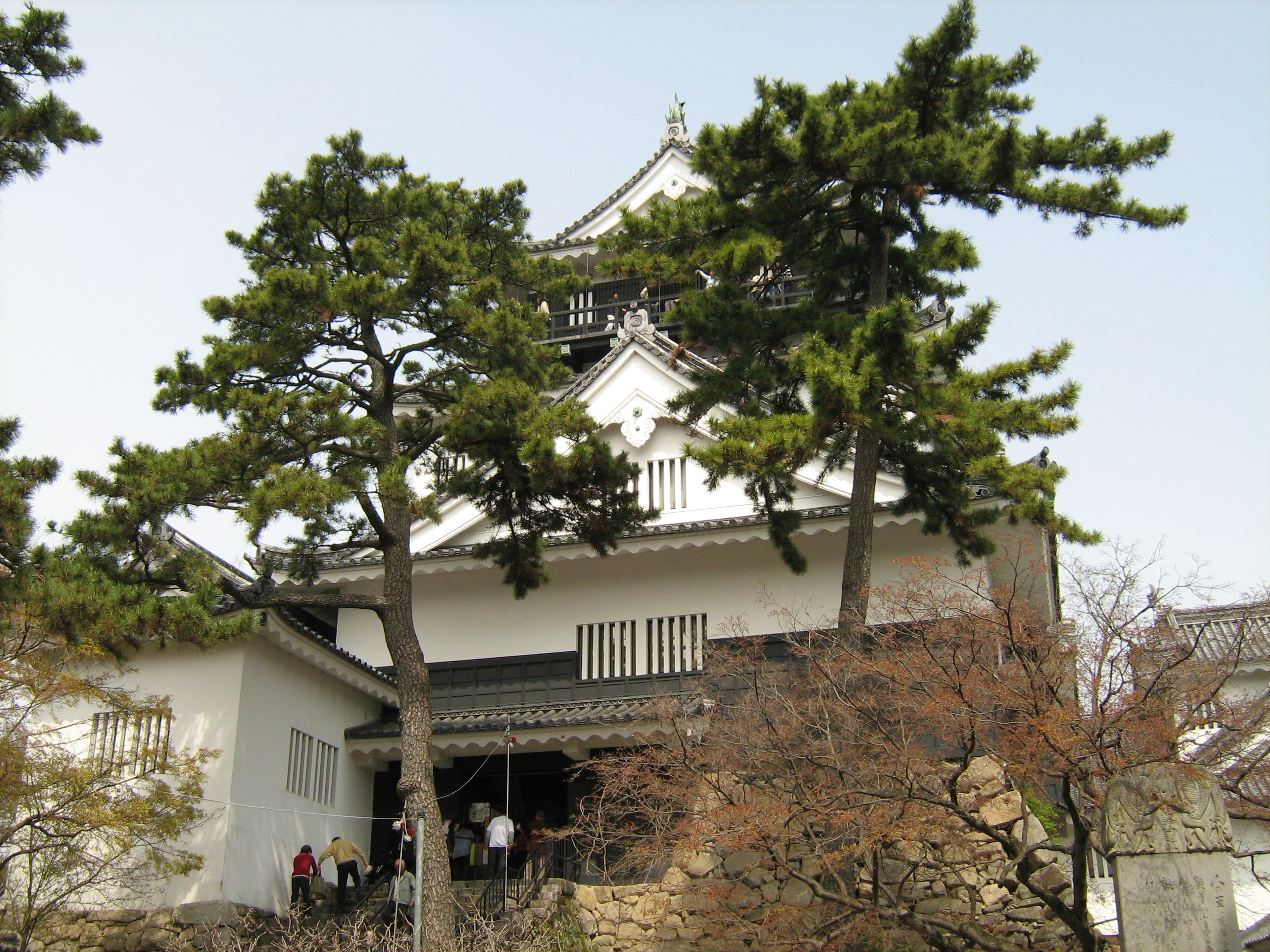 okazaki castle, castelo, park, parque